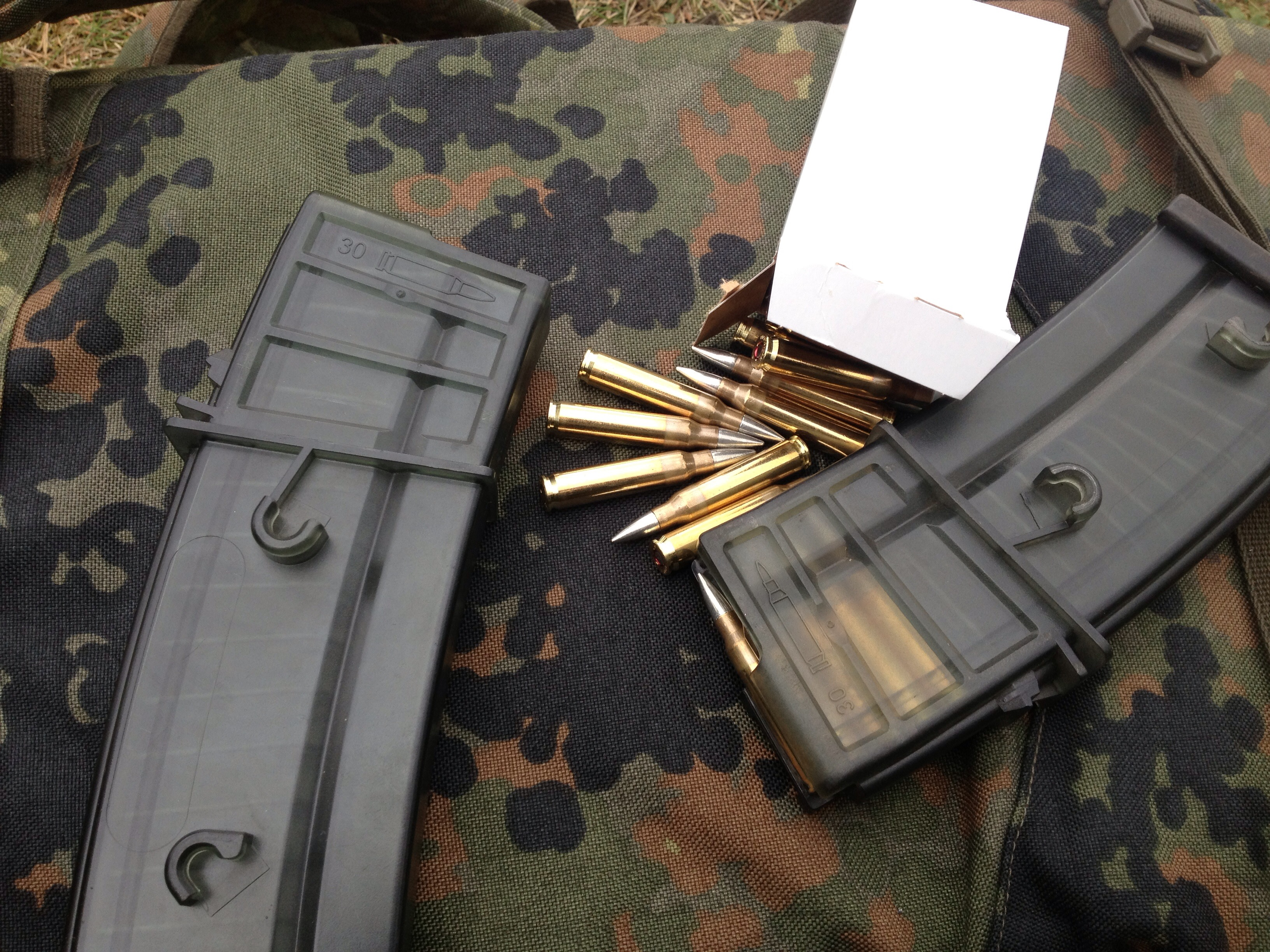 33. IMSB im Sennelager am 27.04.2013